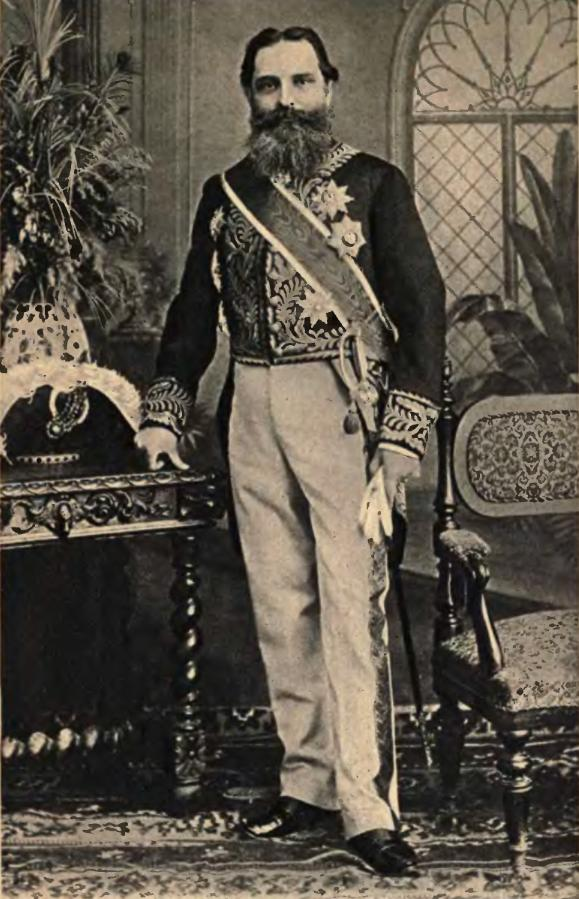 El político y diplomático serbio Cedomilje Mijatović.